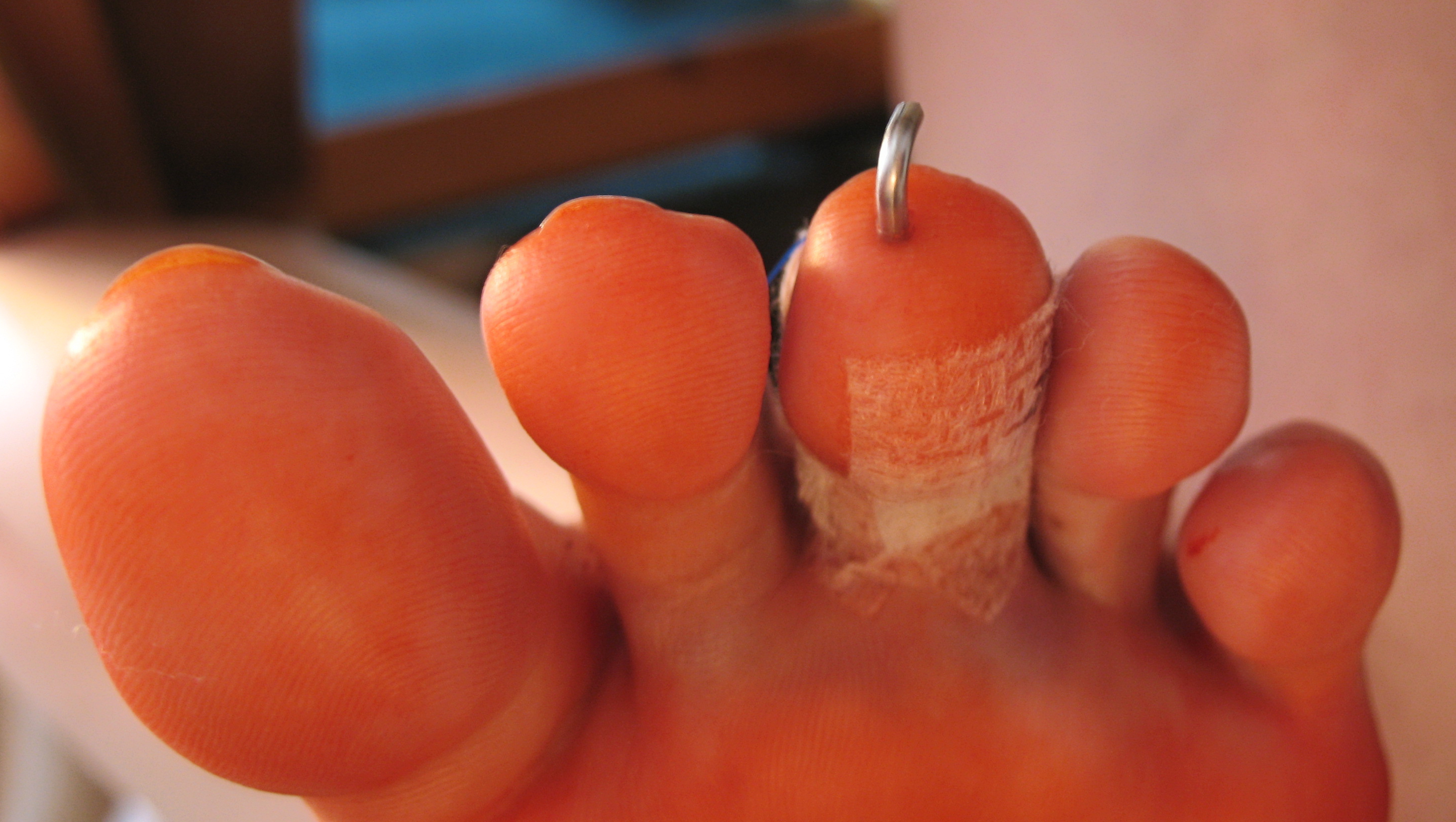 Hammerzehe, direkt nach OP